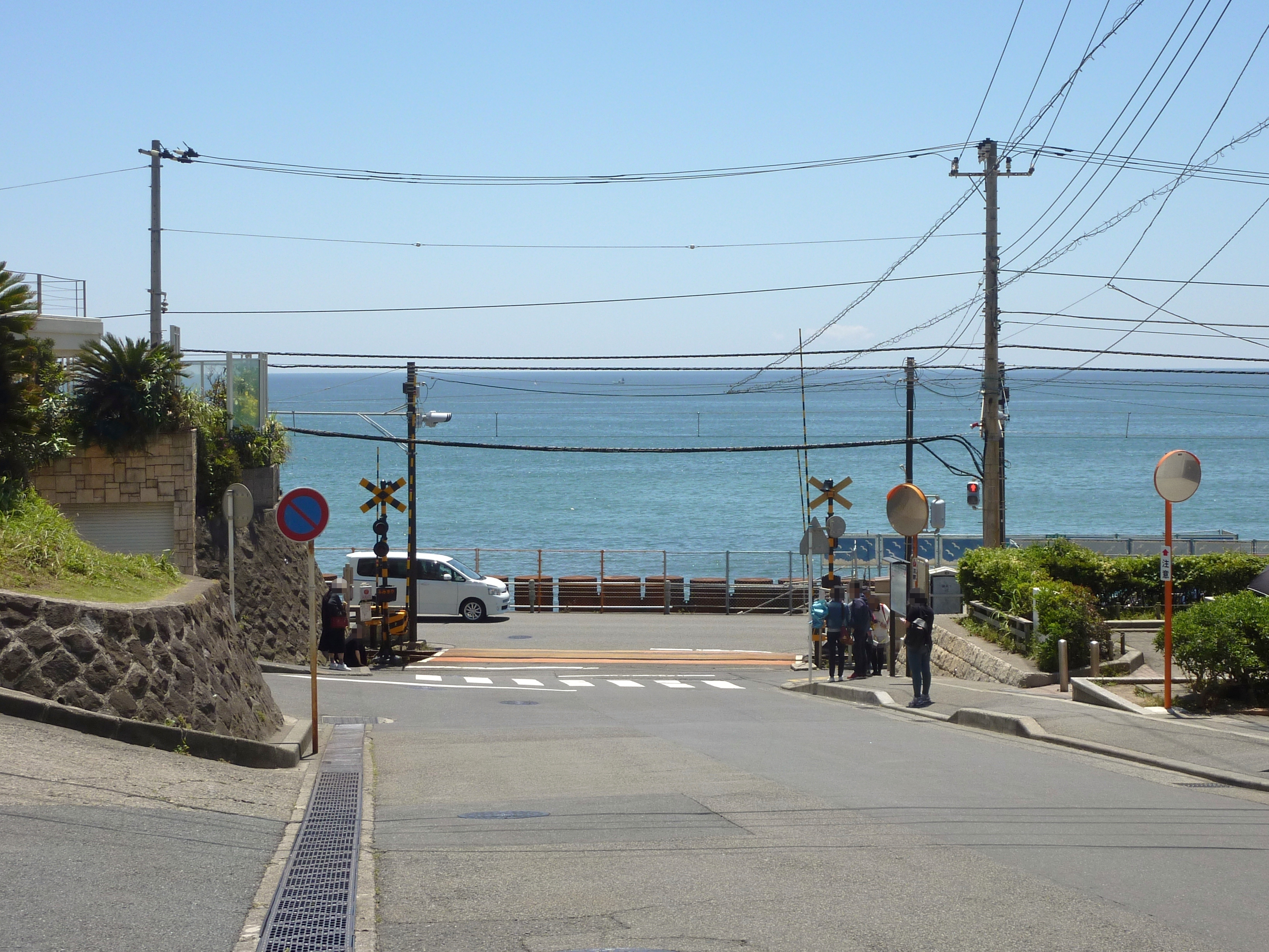 江ノ電・鎌倉高校前駅の踏切（神奈川県鎌倉市）